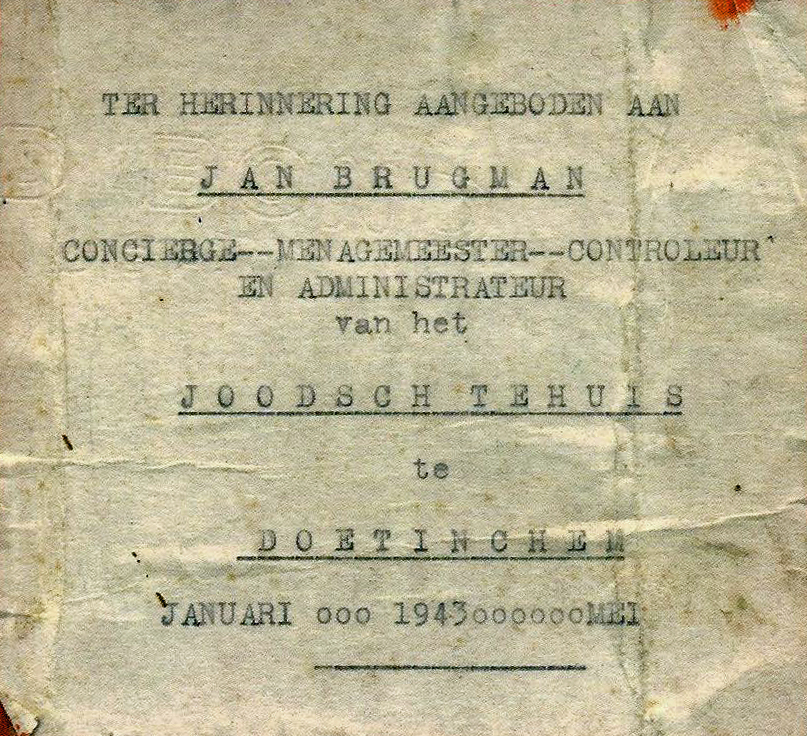 Aanbiedingstekst van het verslag van D.J. Spanjaard over de periode januari t/m 1943 over het verblijf van negen Joden in het Joods tehuis - Villa Bouchina - in Doetinchem